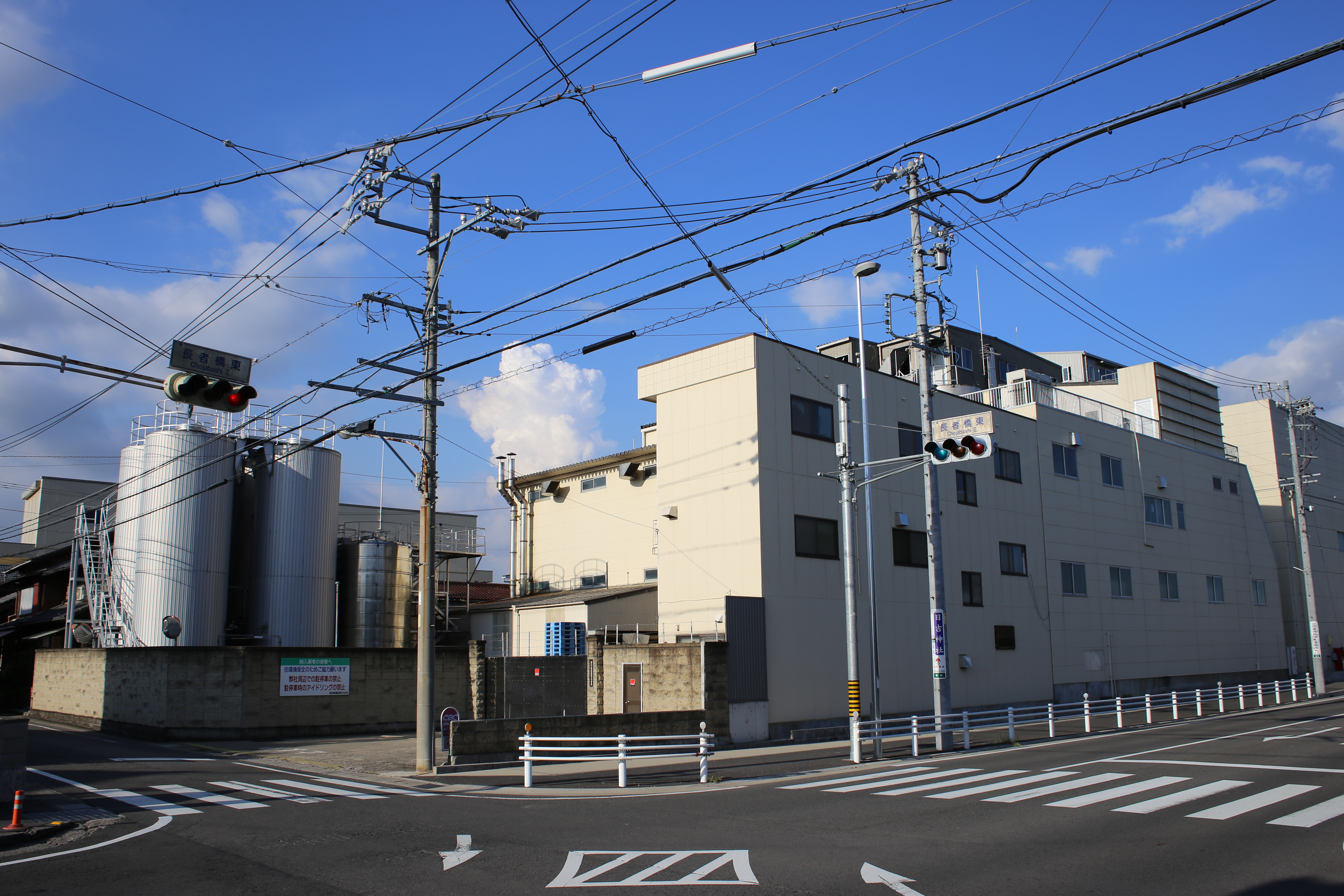 愛知県清須市清洲の清洲桜醸造を南側公道西側より撮影